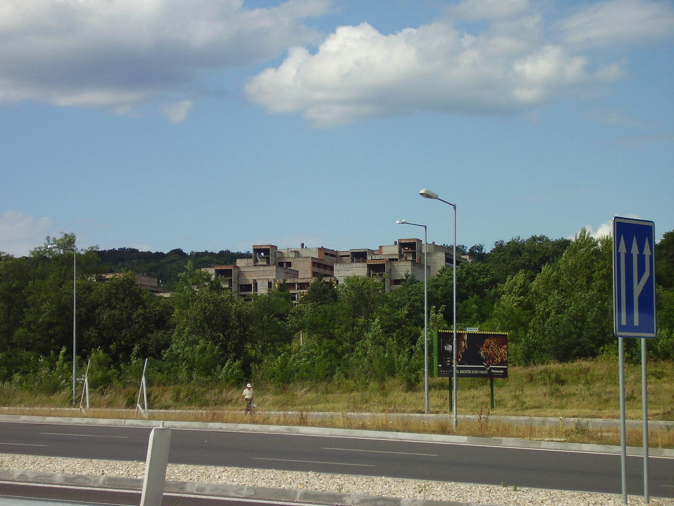 Bratislava